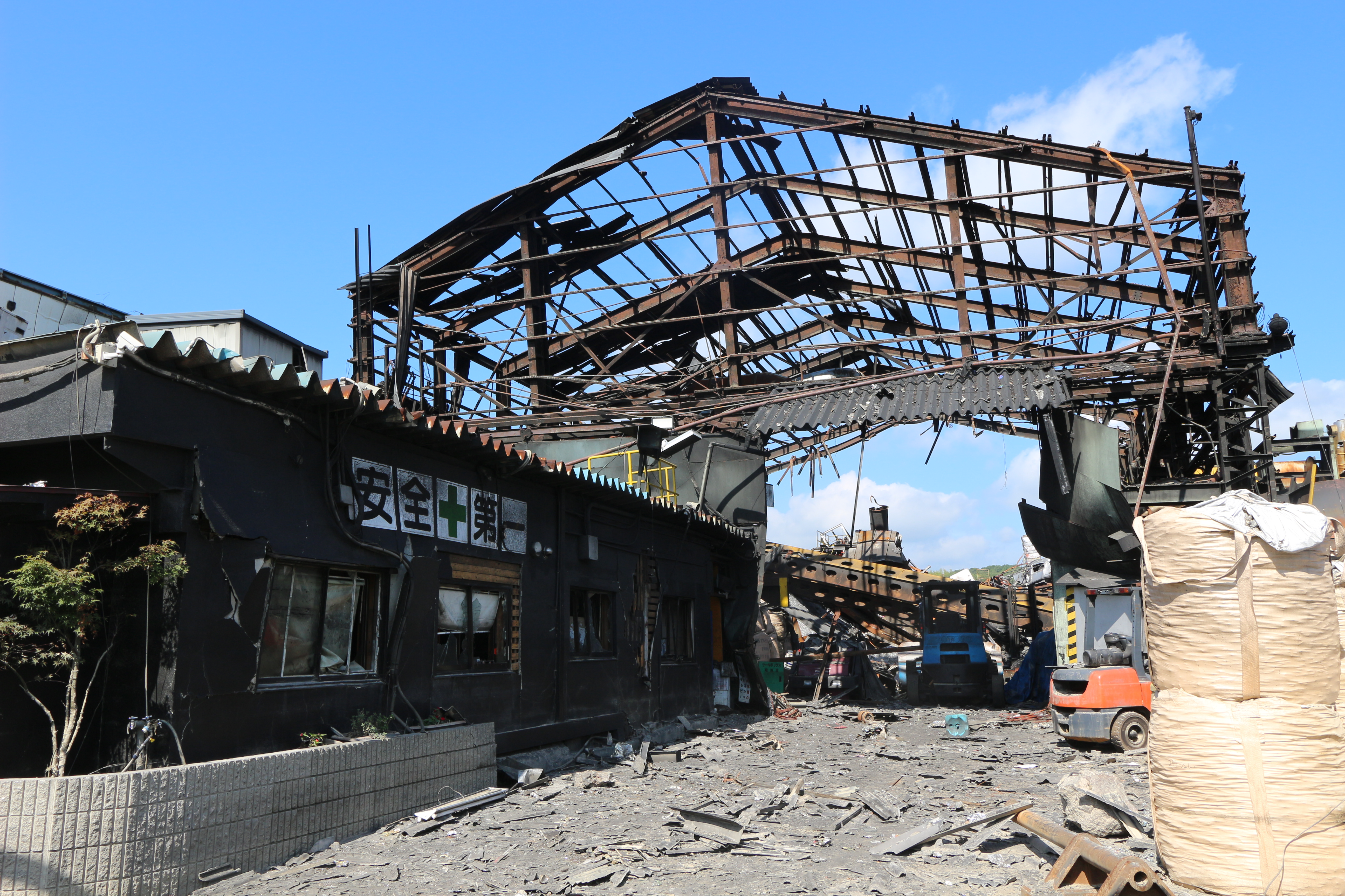 岡山県総社市下原で2018年7月に起きた朝日アルミ産業の爆発事故で全壊した朝日アルミ産業の社屋。左側の建物が事務所。